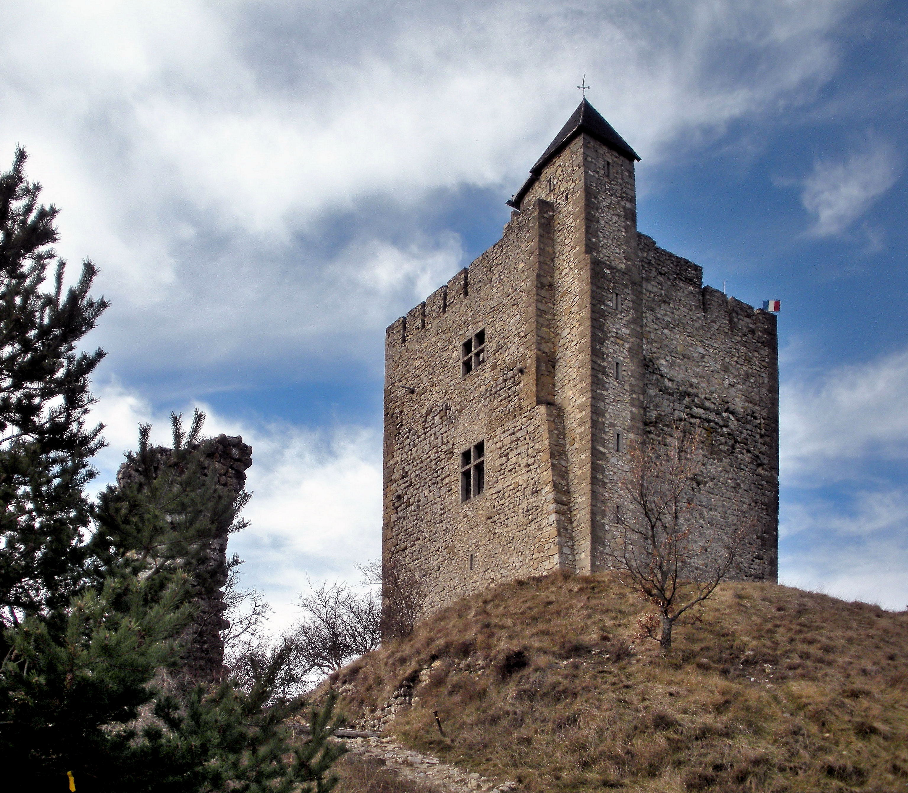 donjon du château de barcelonne (drôme)